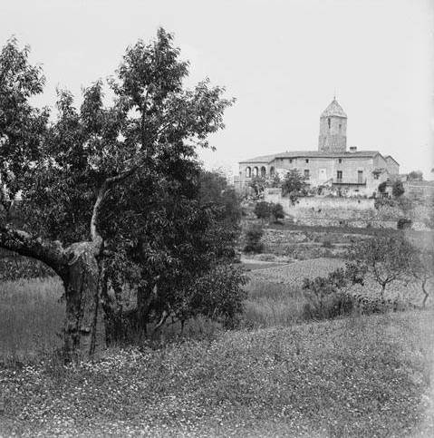 Imatge